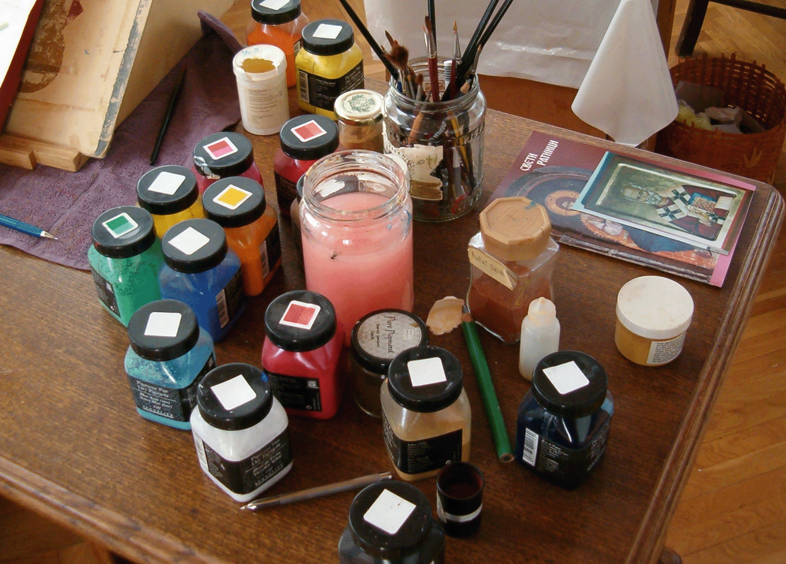 Srpskohrvatski / српскохрватски: Pigmenti